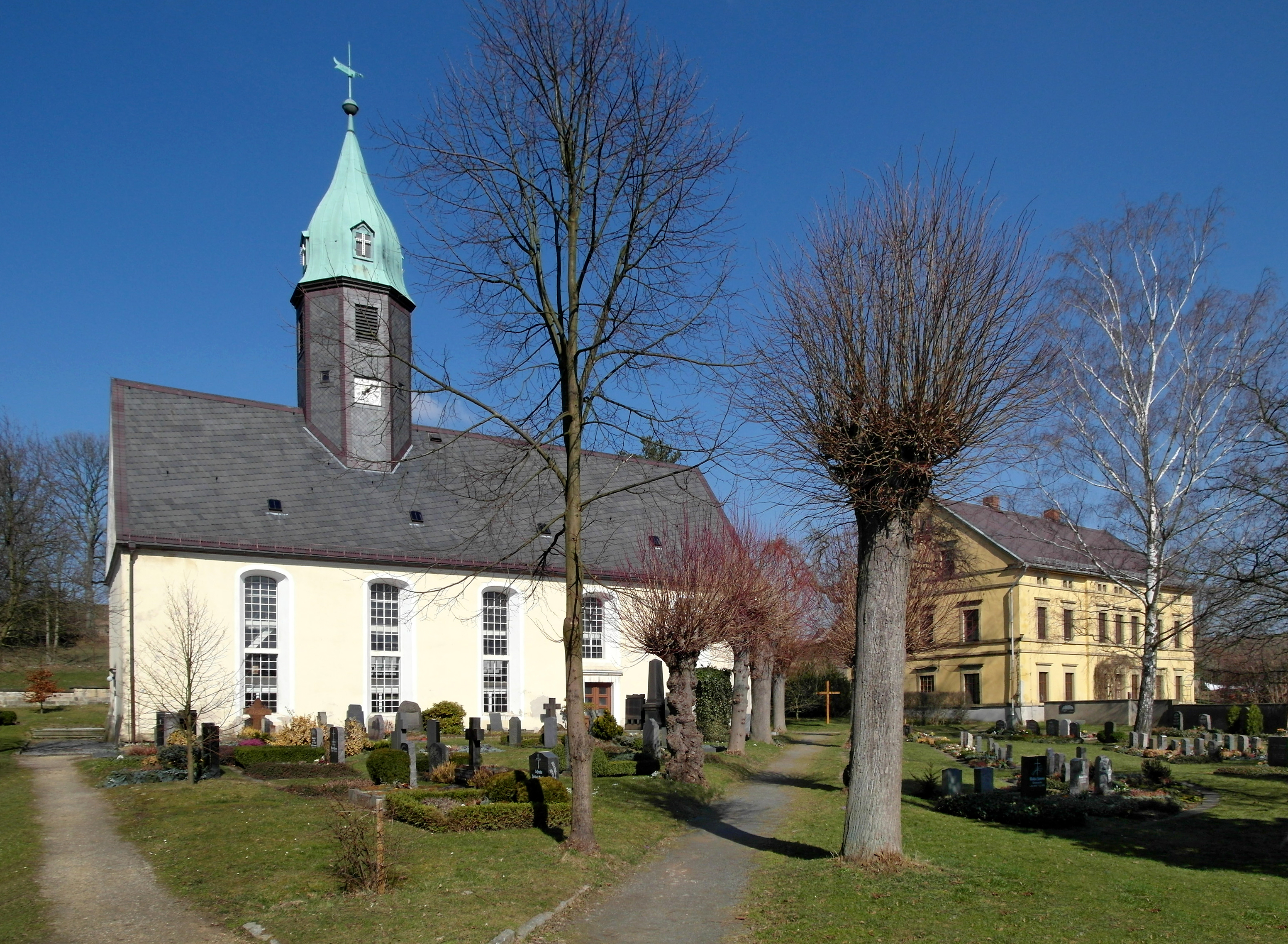 16.03.2016 01833 Langenwolmsdorf (Stolpen), Bergstraße 4: Evangelische Kirche nach dem Umbau von 1846 (GMP: 51.042660,14.116803). Rechts das Pfarrhaus, Bergstraße 7 (GMP: 51.042594,14.117310). [SAM3661.JPG]20160316325DR.JPG(c)Blobelt